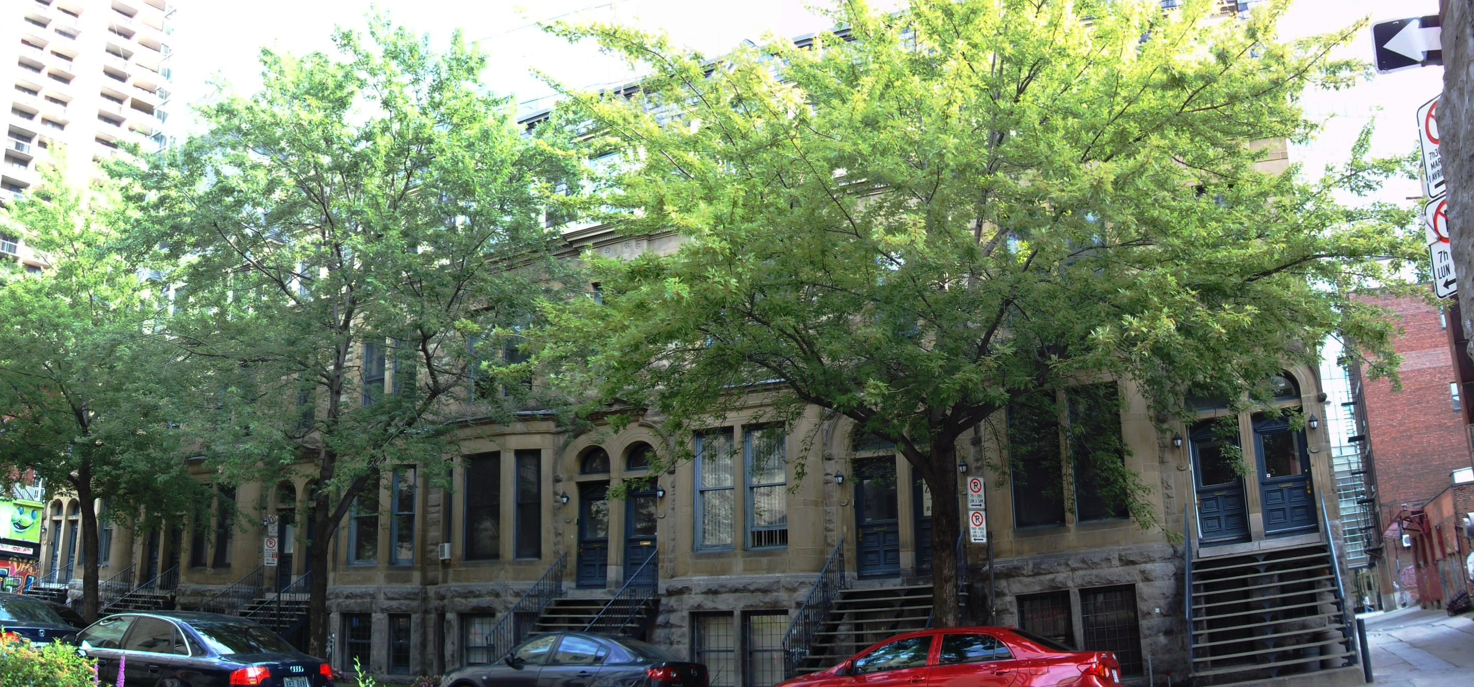 Maisons en rangée William D.-Stroud, 1419-1441, rue Pierce, Montréal (info)